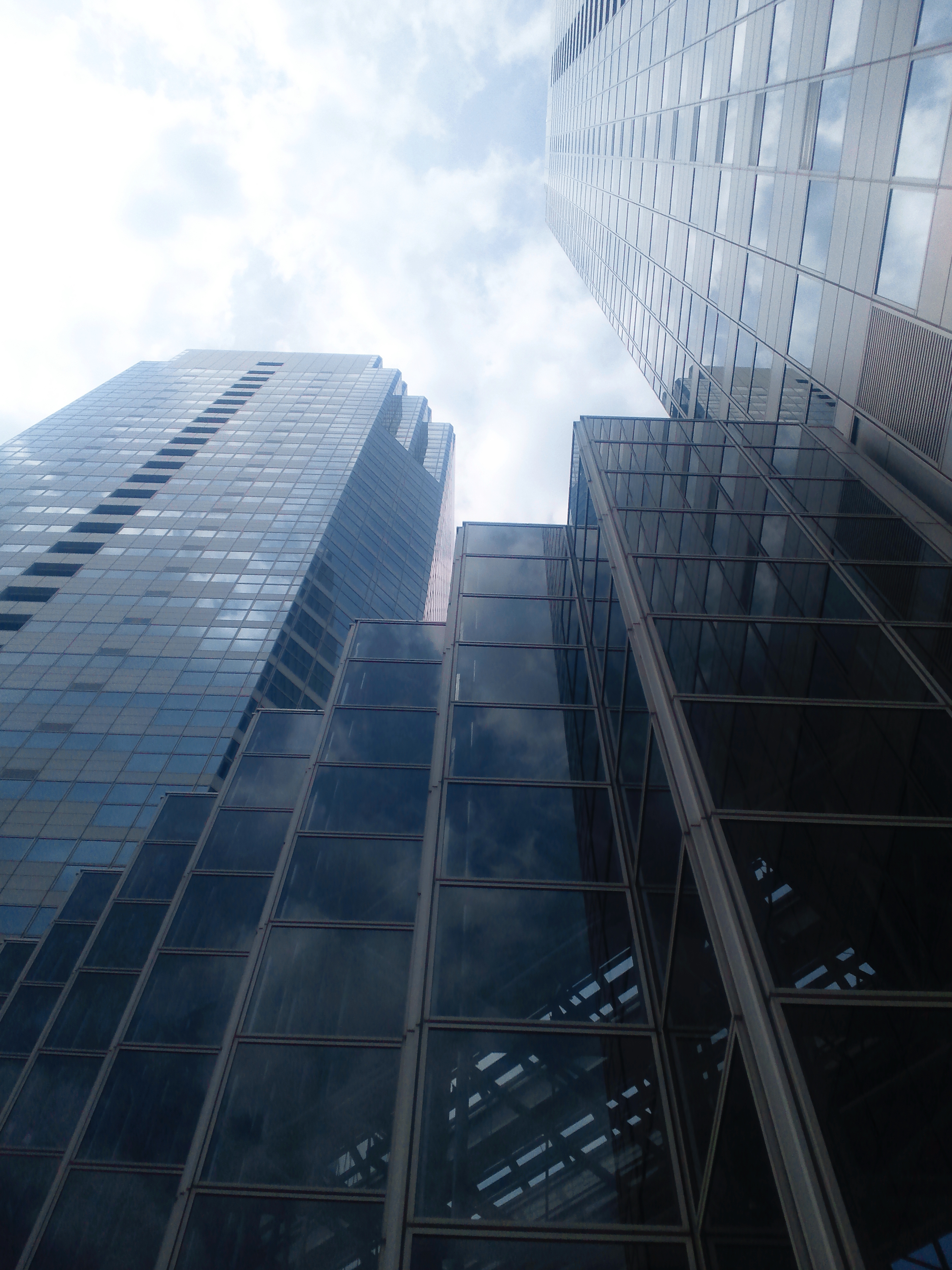 新川崎三井ビルディングを南側出口から撮影。